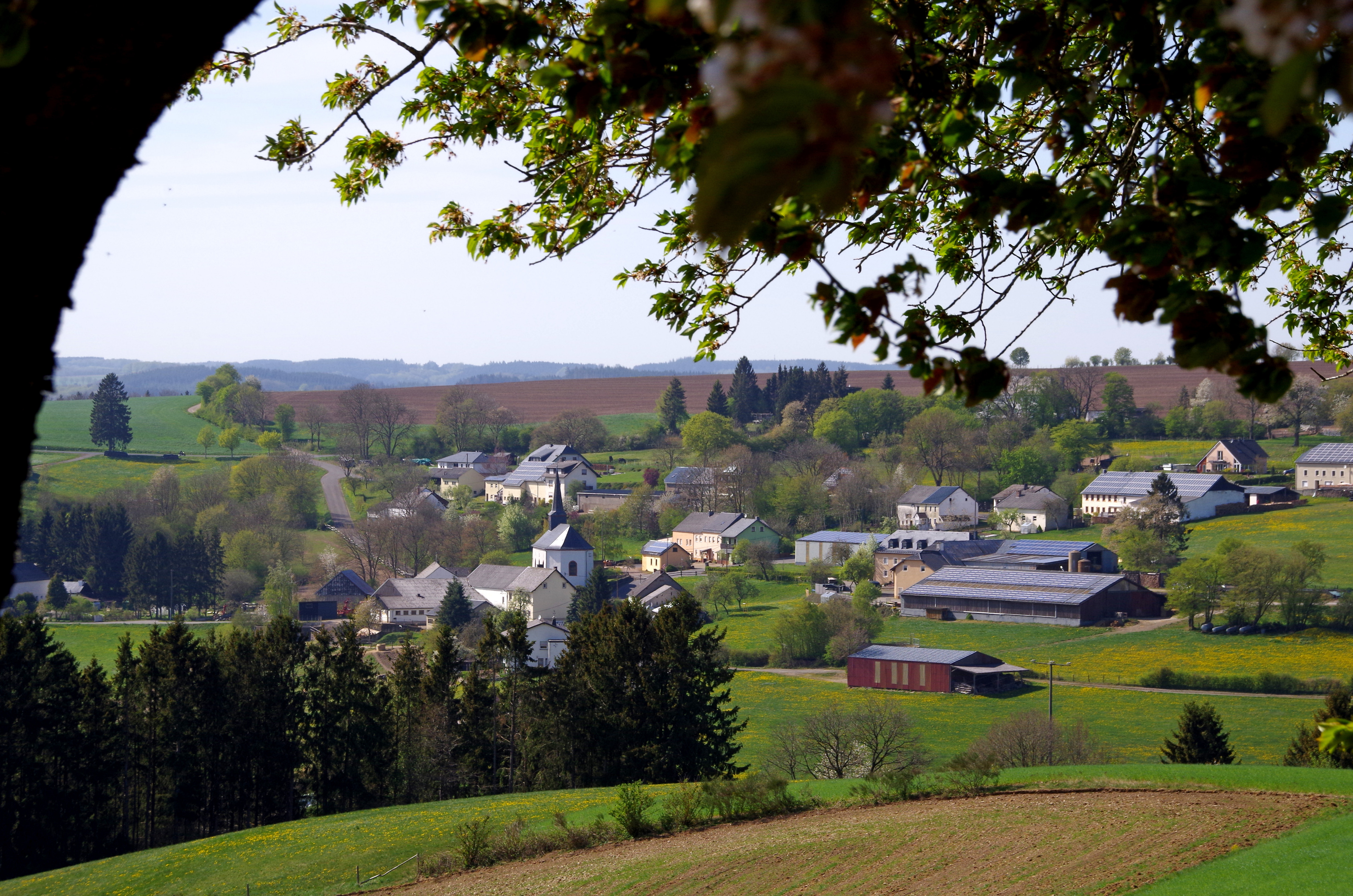 Sevenig (Our)